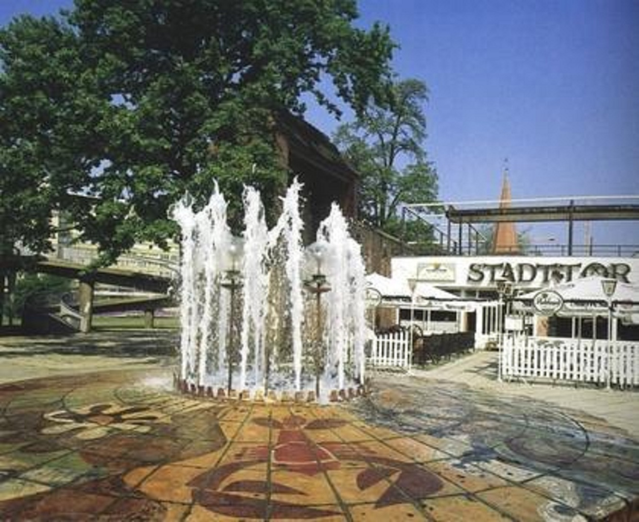 Stadtbrunnen Cottbus (1988)